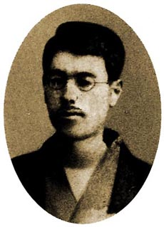 a Japanese critic, Kitamura Tokoku(北村透谷)